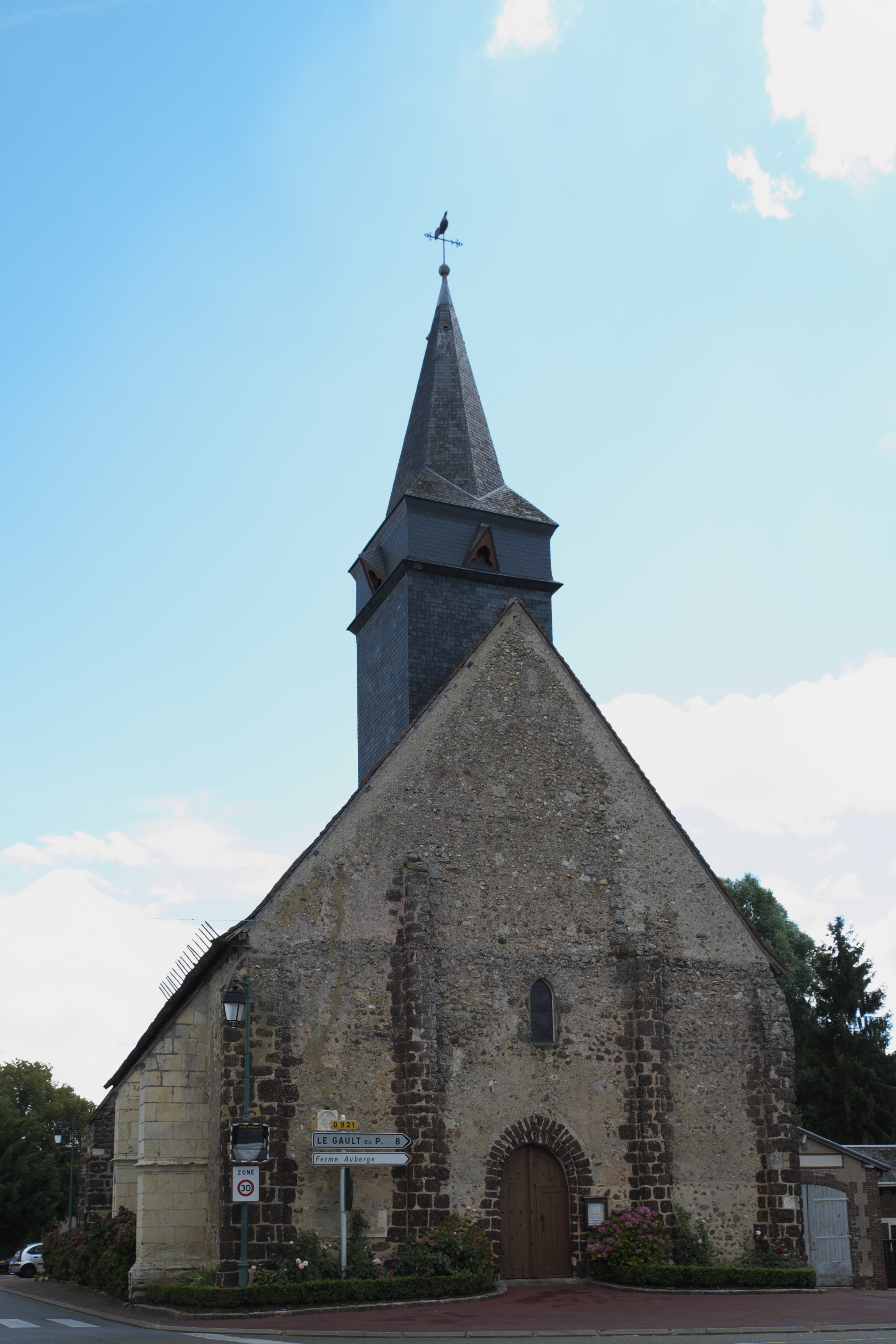 Katholische Kirche Notre-Dame in Chapelle-Royale im Département Eure-et-Loir (Centre-Val de Loire/Frankreich)